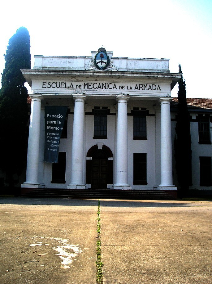 ESMA, Escuela de Mecánica de la Armada. Centro Clandestino de Detención (CCD) entre 1976-1983. Buenos Aires. Argentina.